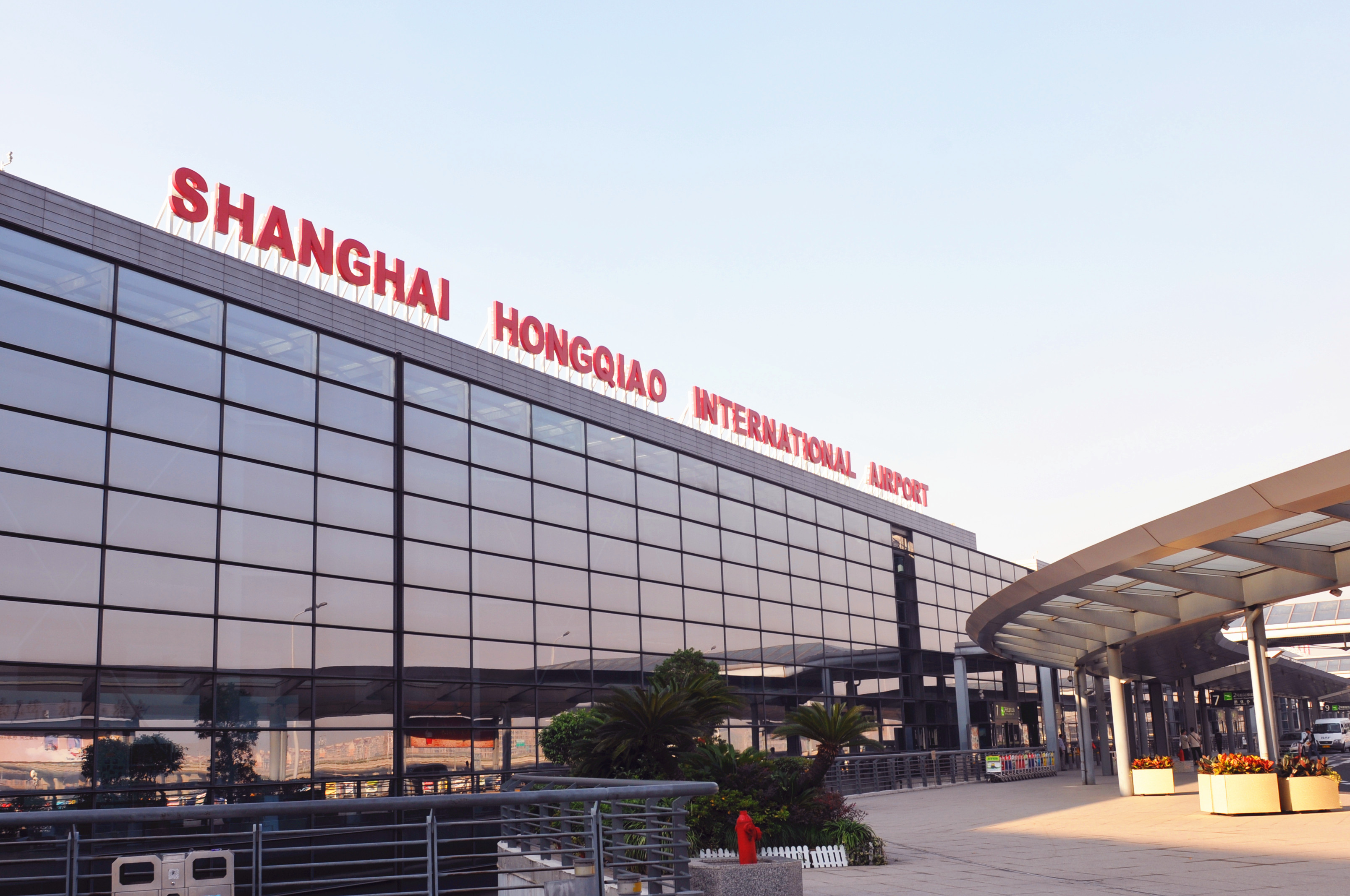 Minhang, Shanghai, China